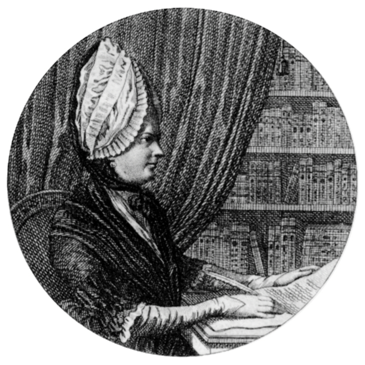 Sophie von La Roche, detail from: title page of Mein Schreibetisch, vol. 1